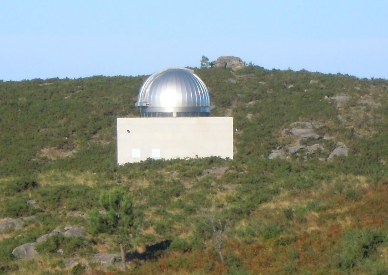 Observatoire astronomique de Cotobade, dans la province de Pontevedra (Espagne).